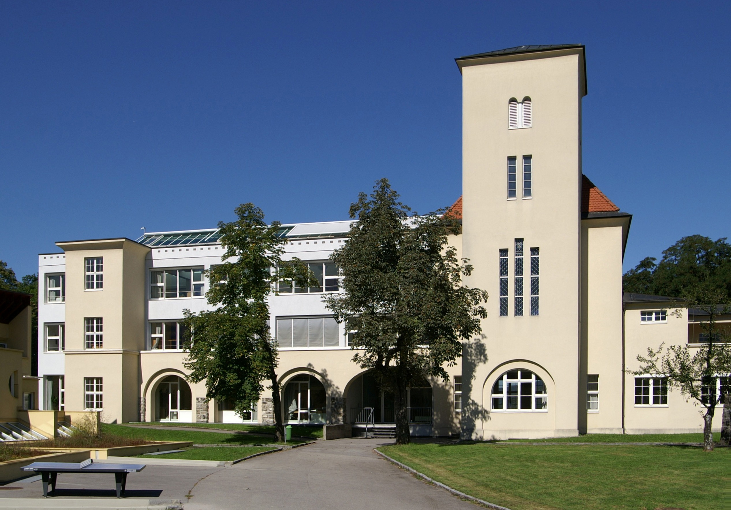 Schule des Sozialpädagogischen Internat des Vorarlberger Kinderdorf auf dem Jagdberg in Schlins. aus dem DEHIO Vorarlberg 1983: 1927 nach Plan von Willibald Braun erweitert. Hauptgebäude 3geschossig, im Mittelteil 6achsig, 3achsige Seitenfront, Erdgeschoß mir Rundbogenarkaden. Kapelle im Ostflügel, im Süden Chorturm mit Rechteckschlitzen und gekoppelten Rundbogenschallöffnungen, im Norden Giebelfassade mit steilem Satteldach. Gegen Osten 2geschossiger 7achsiger Bau mit 3geschossigem 3achsigem Mittelrisalit.